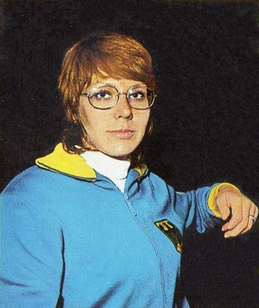 MUNCHEN/MONACO '72-PANINI-Figurina n.120- ROSENDAHL - BRD -ATLETICA LEGG.-Rec